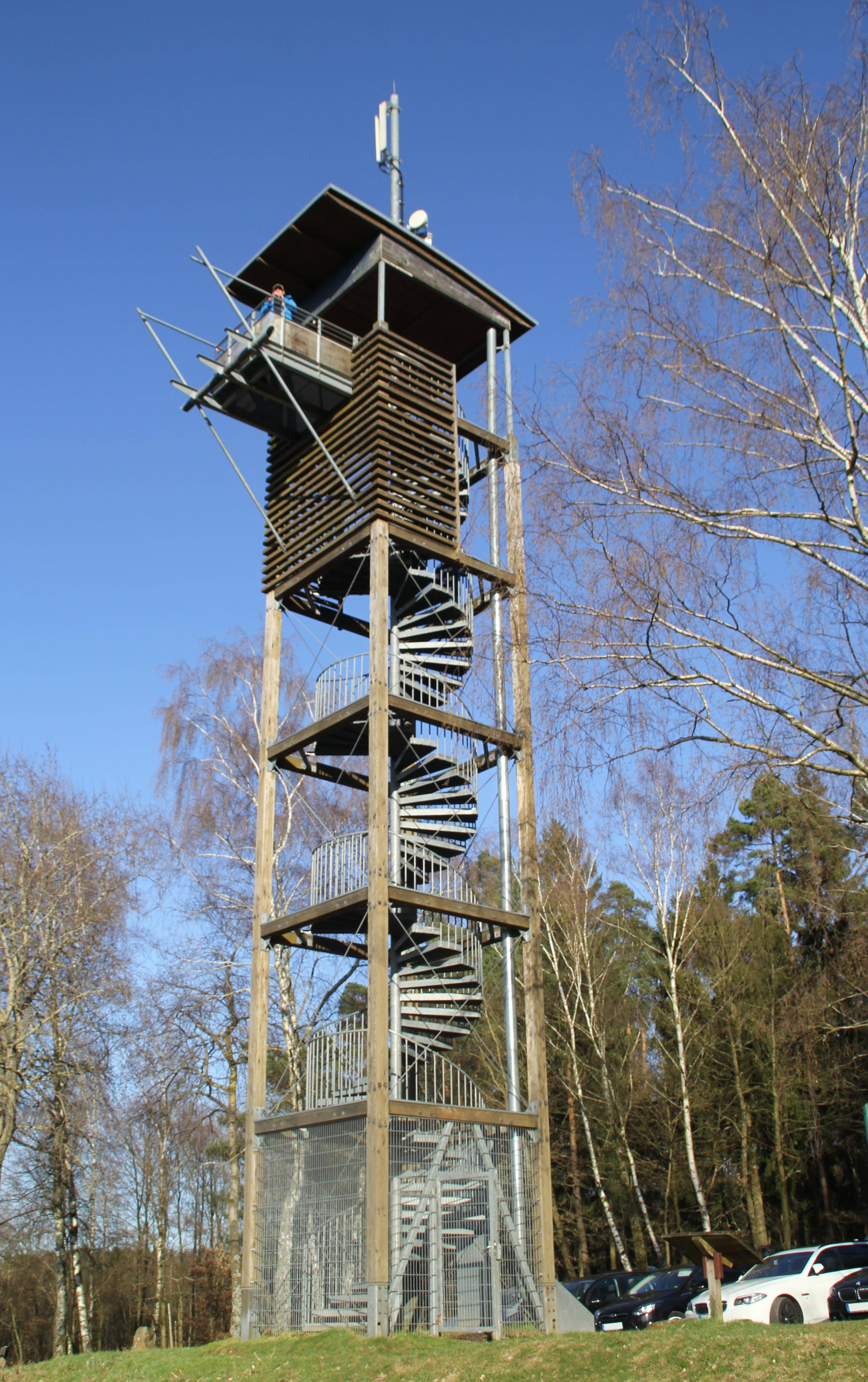 Der Rodfeldturm am Rodfeld am Rande der Sölzert bei Freigericht/Neuses, Hessen